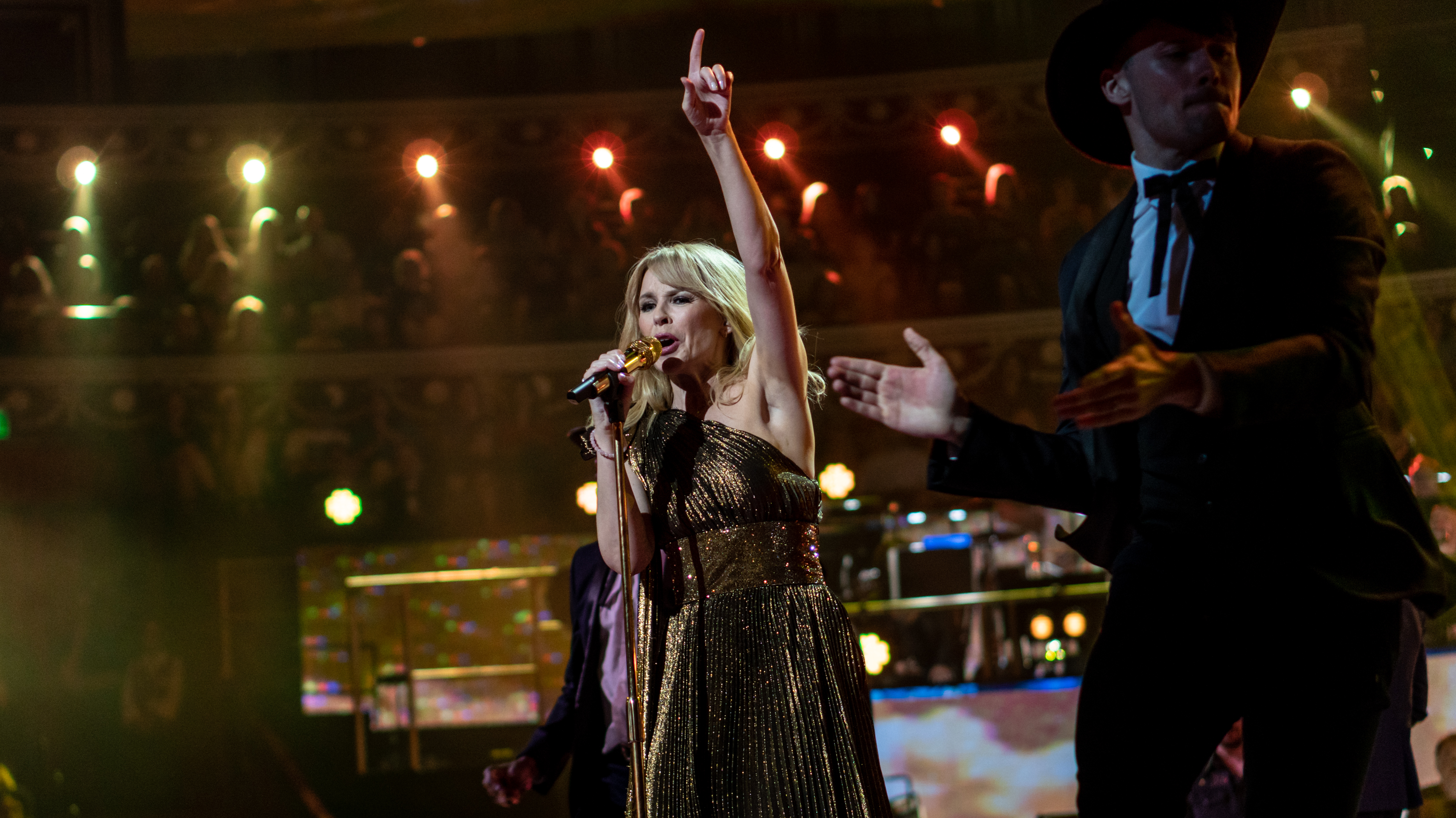 QueenbdayRAH210418-13